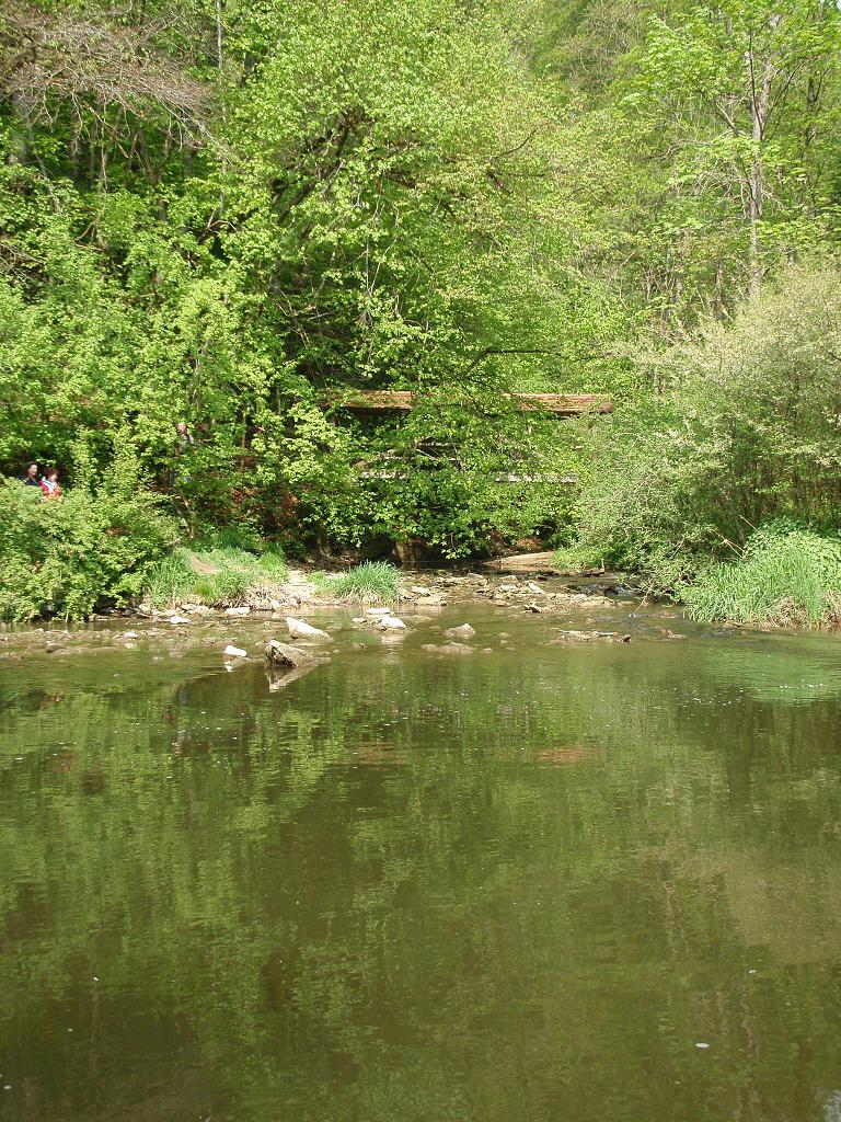 Mündung der Gronach in die Jagst, mit Holzbrücke des Jagsttal-Wanderwegs